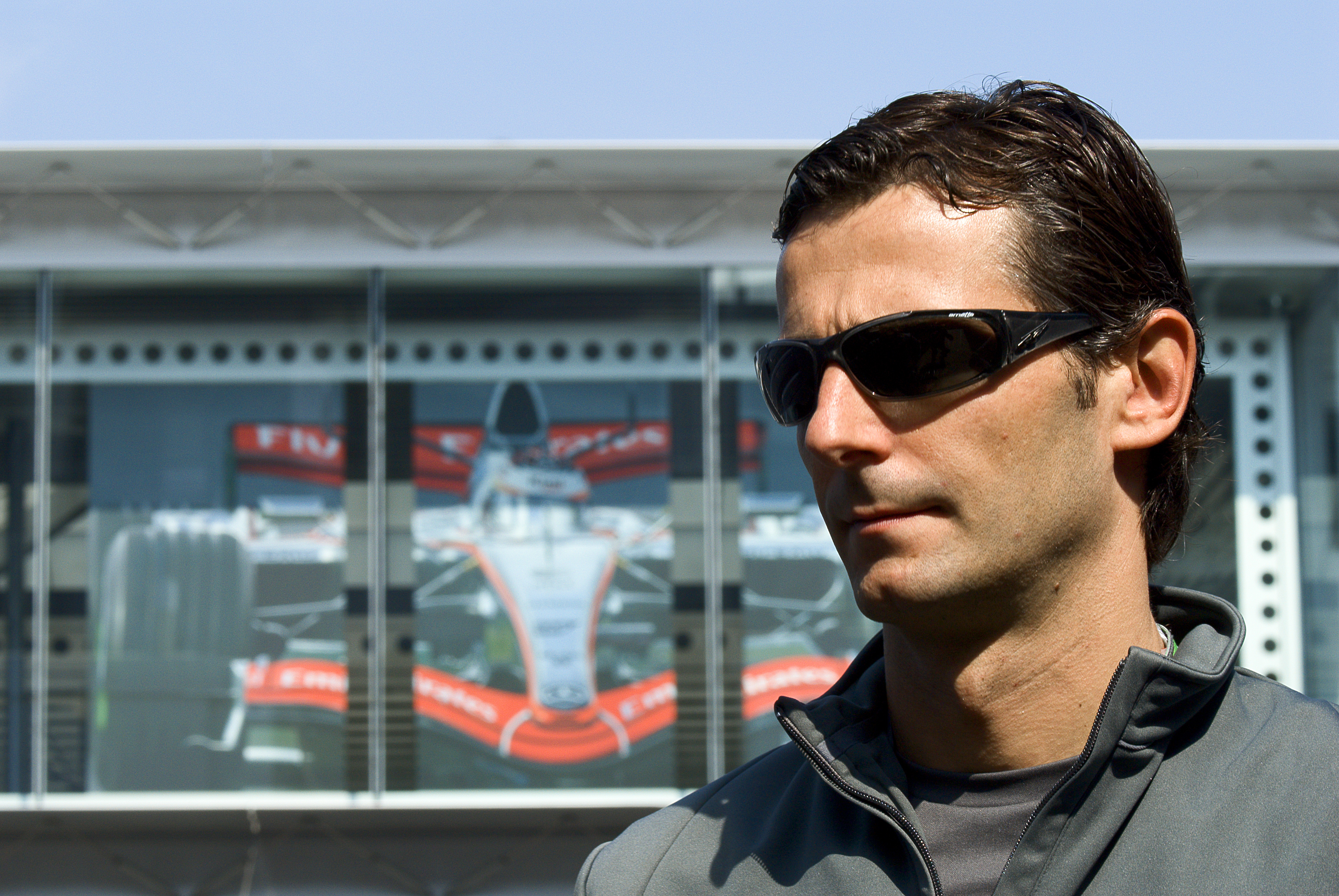 Pedro de la Rosa, McLaren test driver